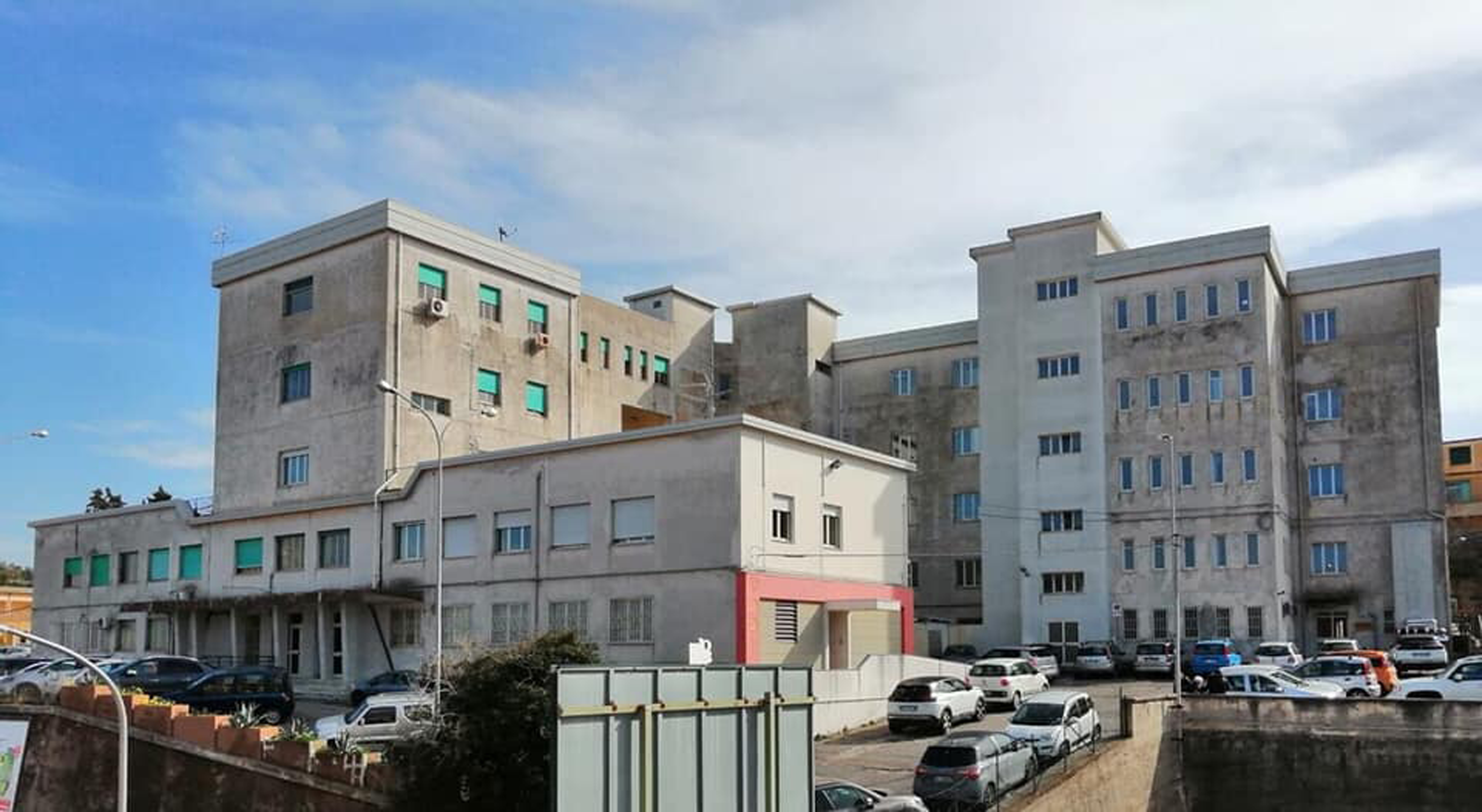 Ospedale Civile "Francesco Pentimalli" di Palmi